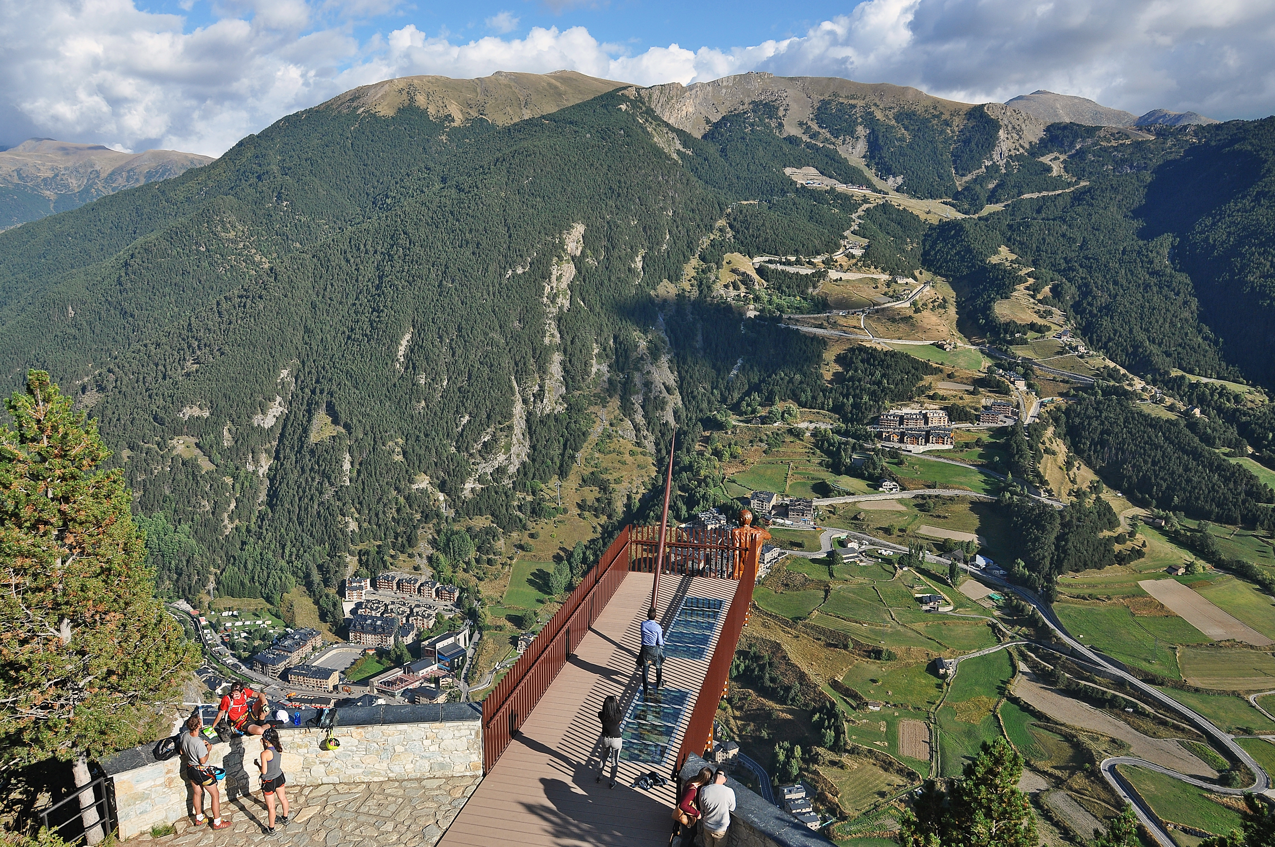 Canillo-Andorra